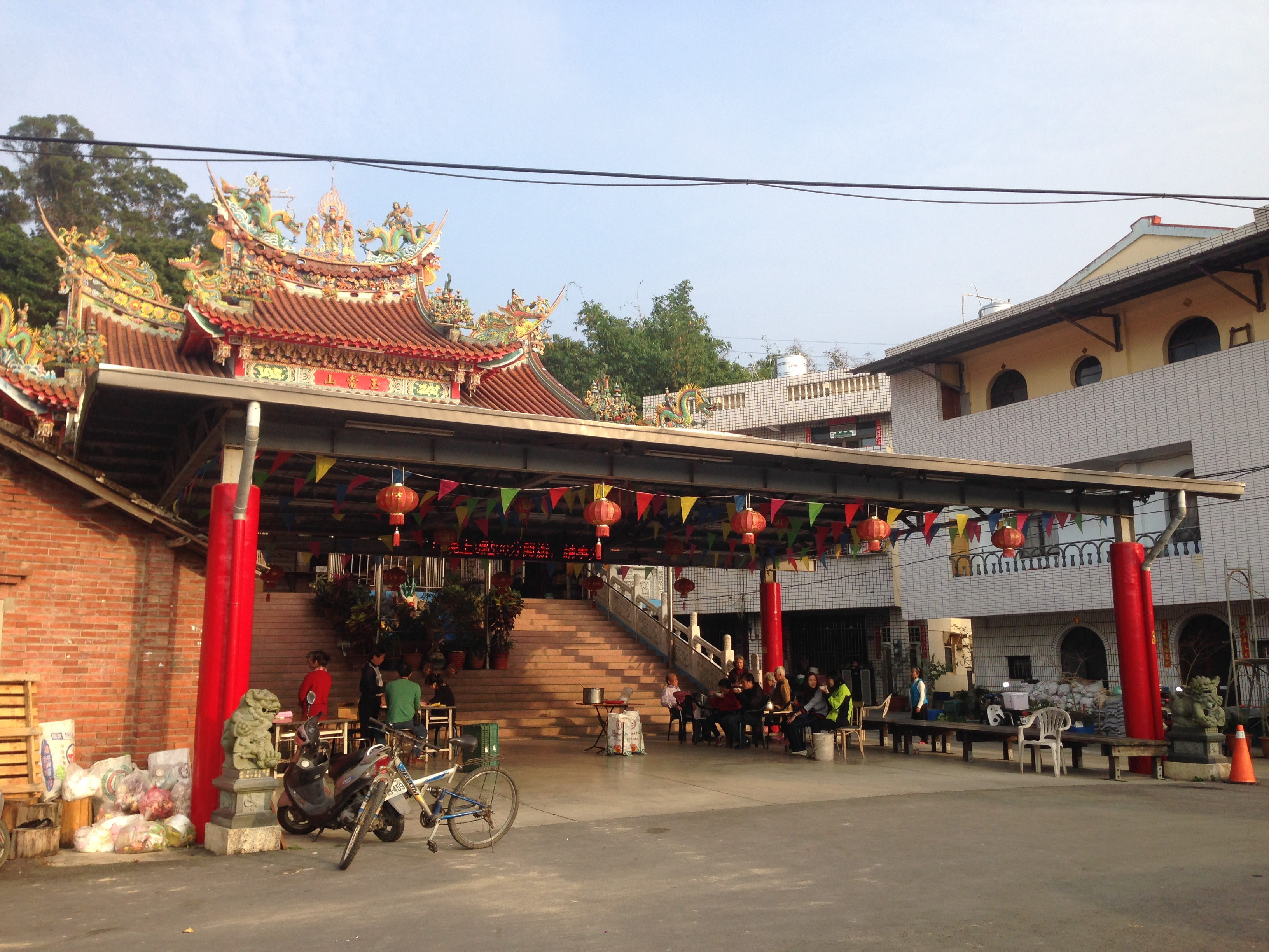 中文（台灣）: 玉當山帝爺廟